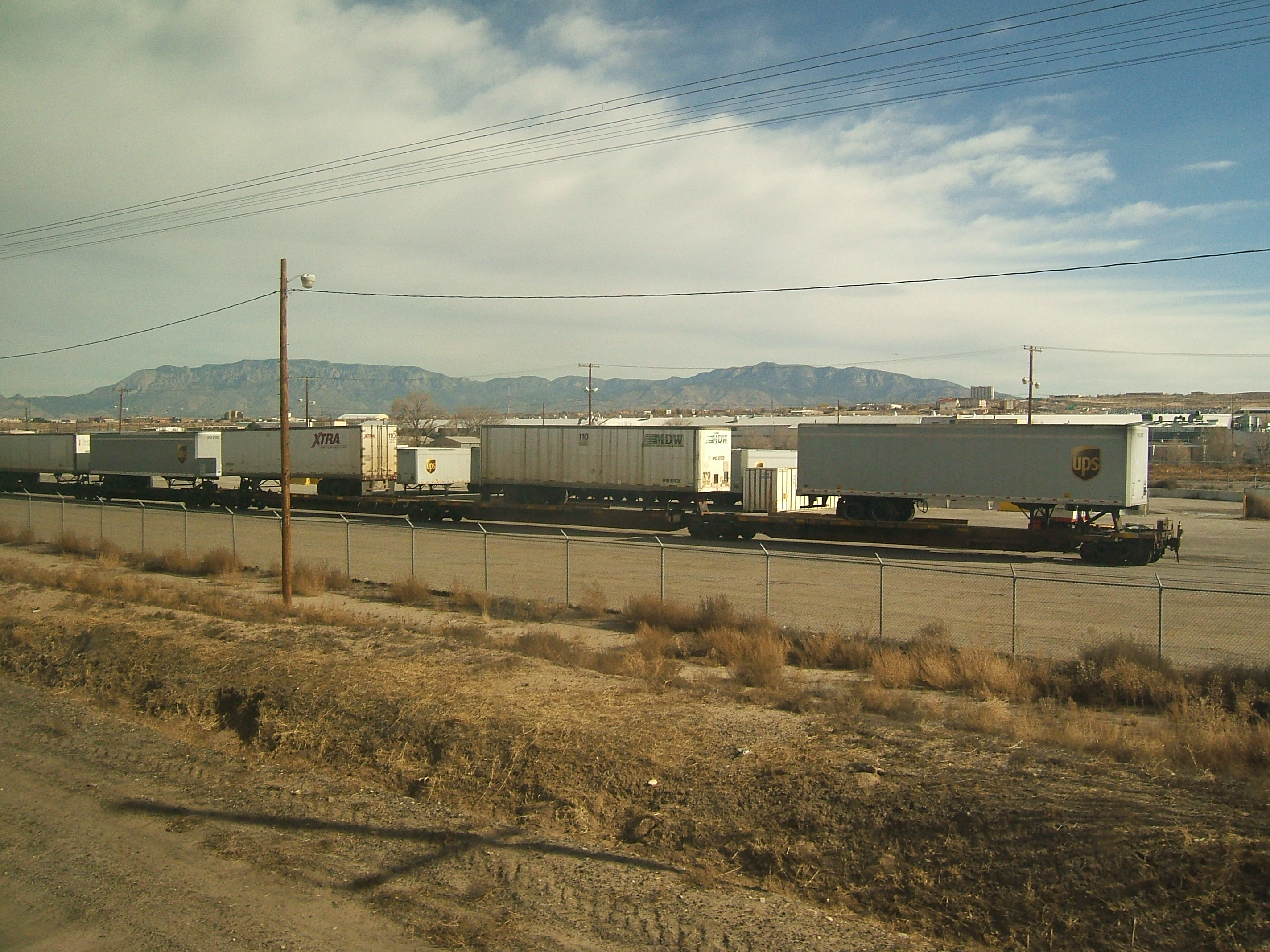 Roadrailers in Albuquerque, New Mexico.